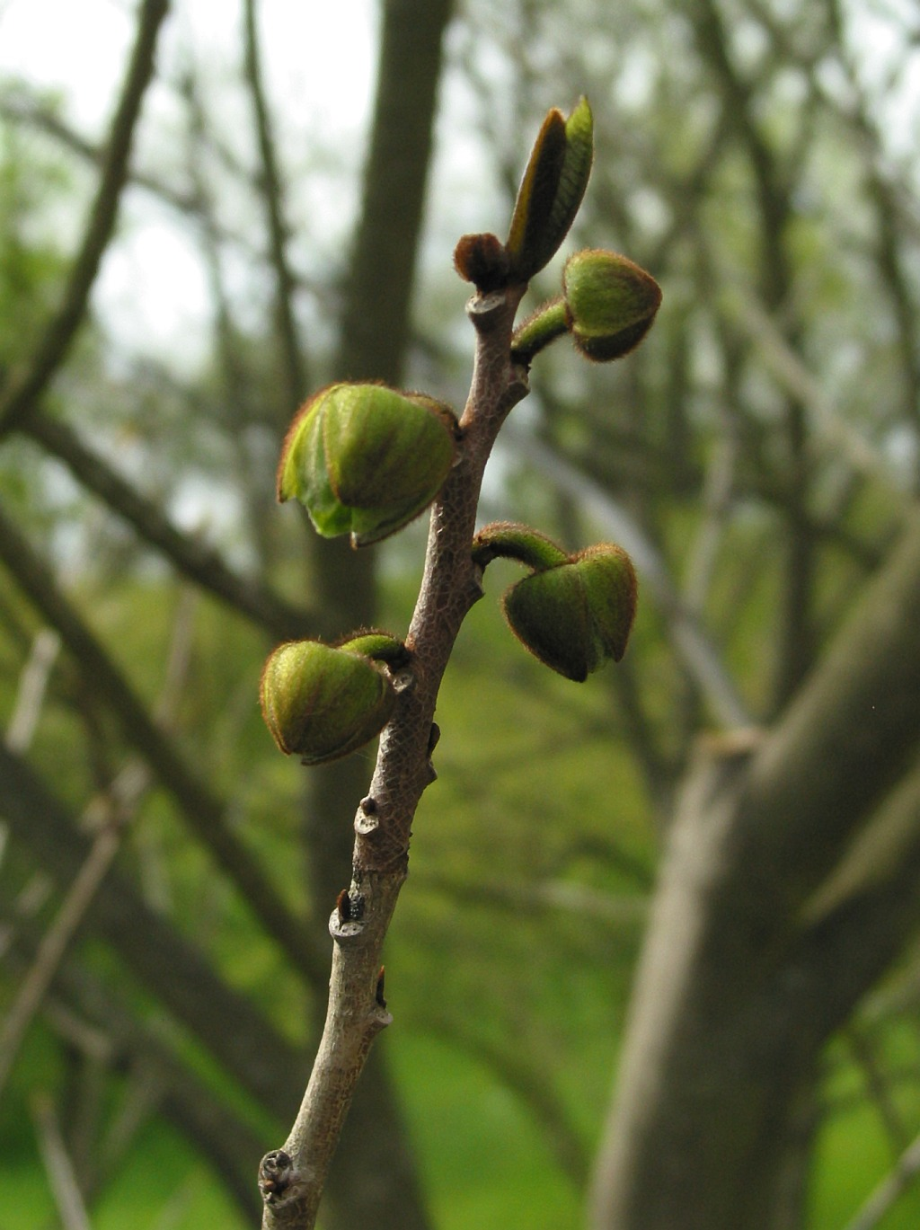 Austrieb an einer Pawpaw (Asimina triloba) im Botanischen Garten Berlin